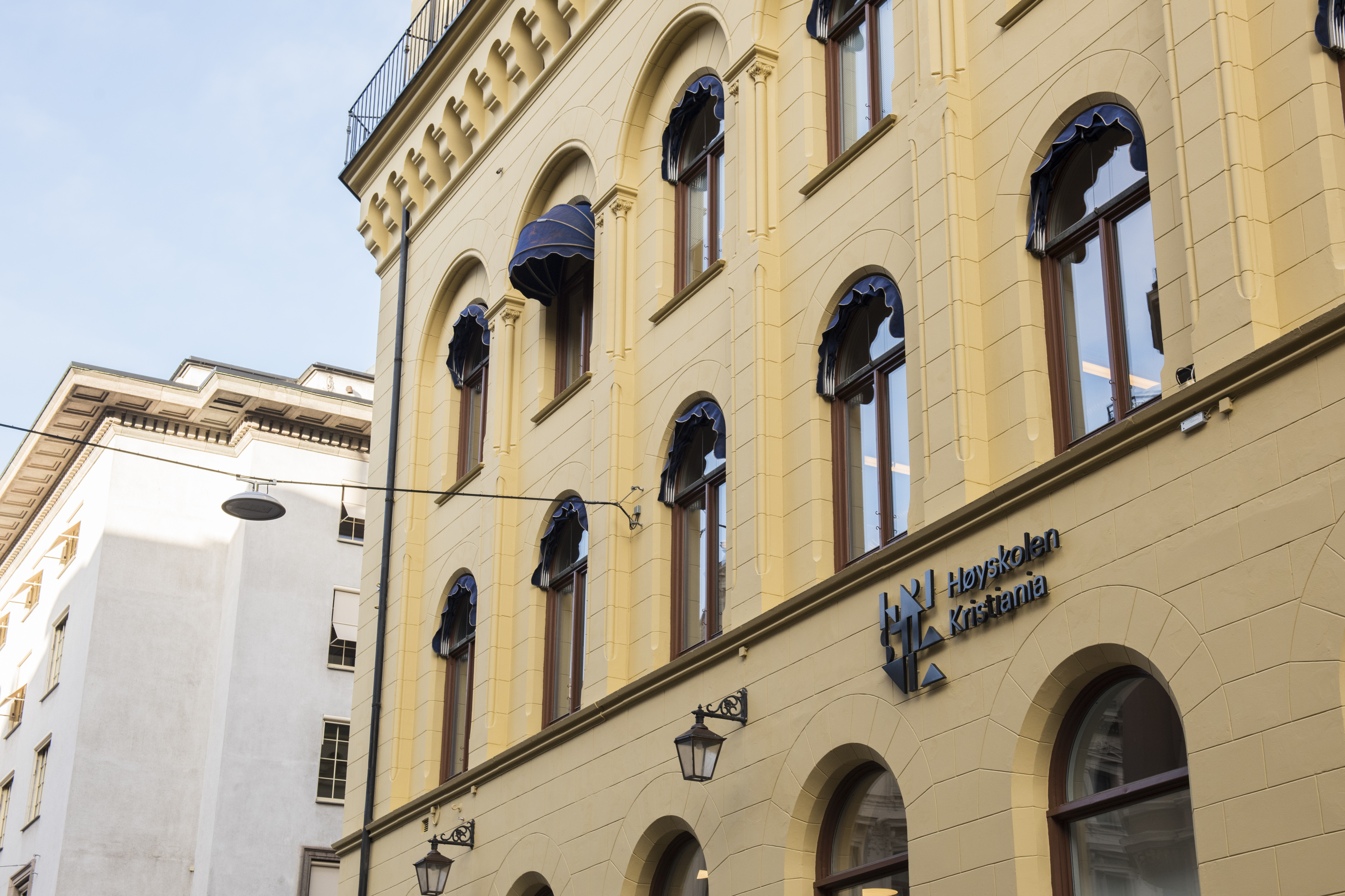 Prinsens gate 7-9, Oslo